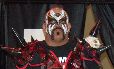 Le visage de Road Warrior Animal en mars 2017